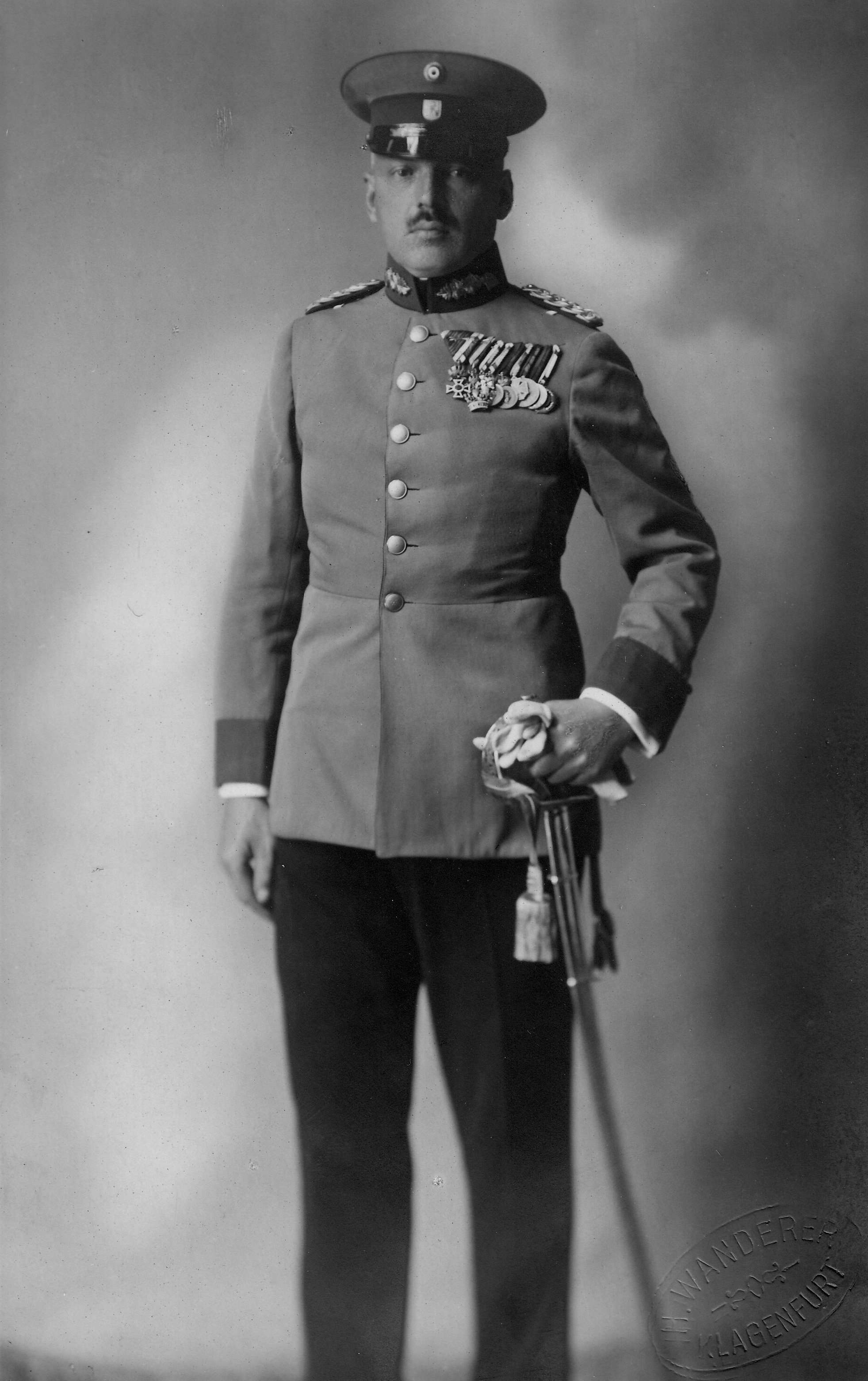 Generalmajor Eugen Bregant (1876-1936)